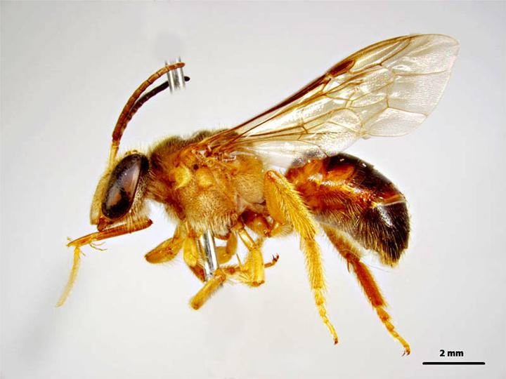 Reepenia bituberculata male